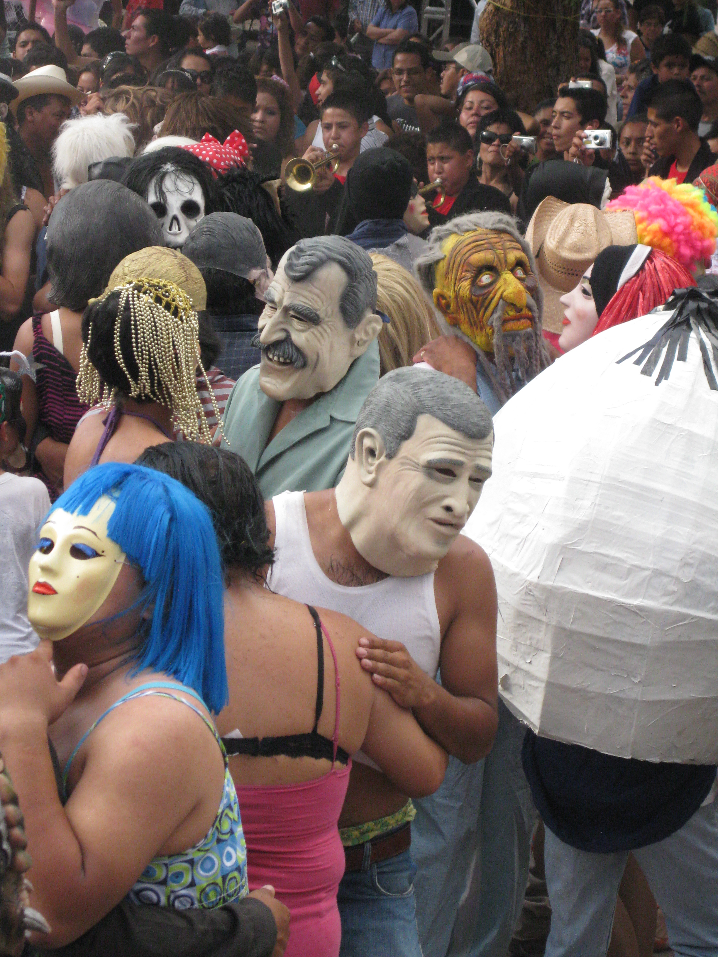 Mojiganga, tradición que vive.